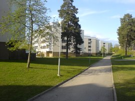 Hyreshus i Sätra